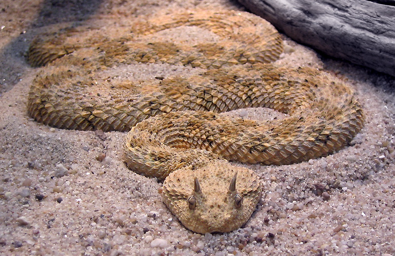 Eine Viper... (by Harfus)